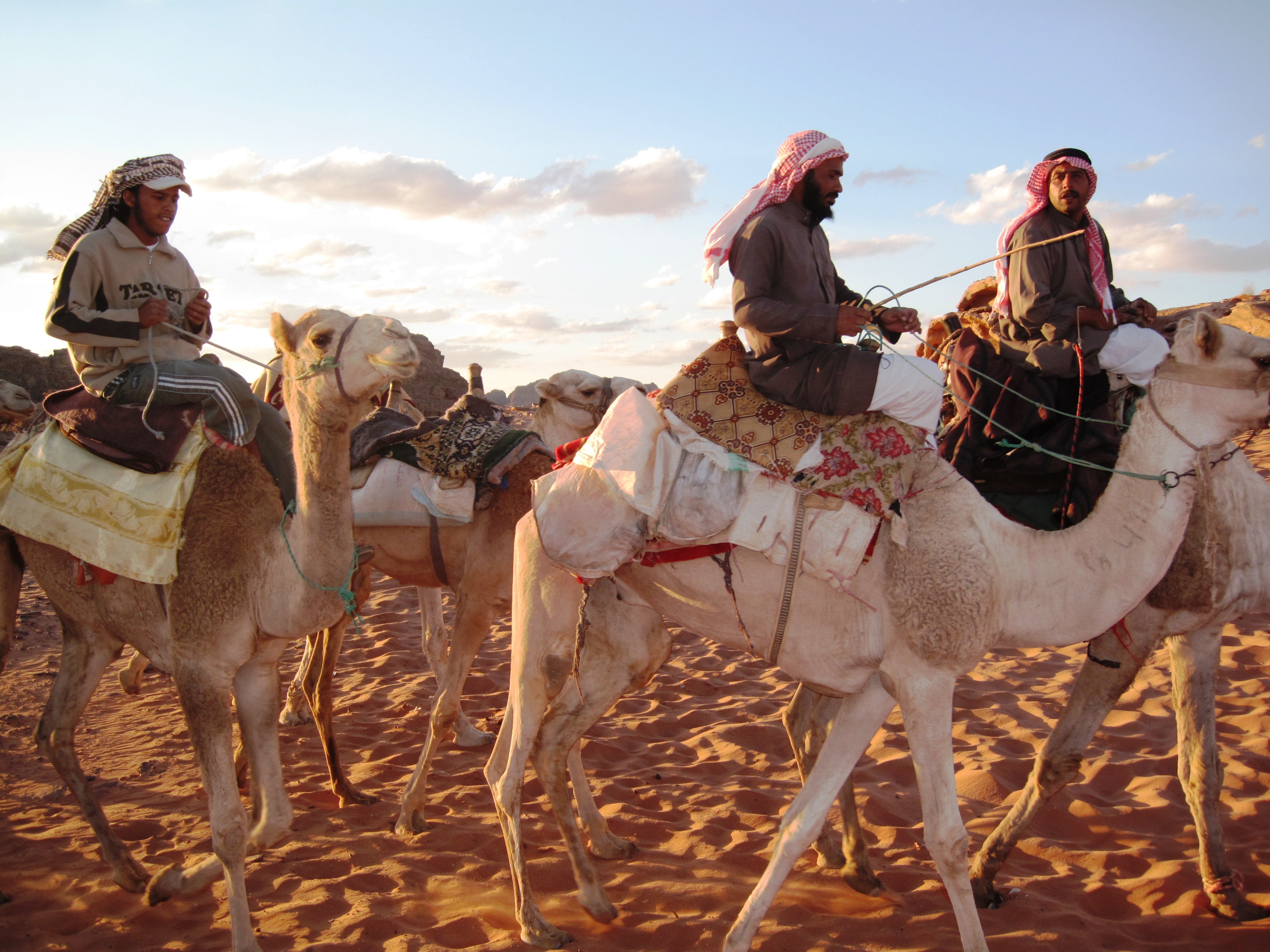 Wadi Rum Jordnië